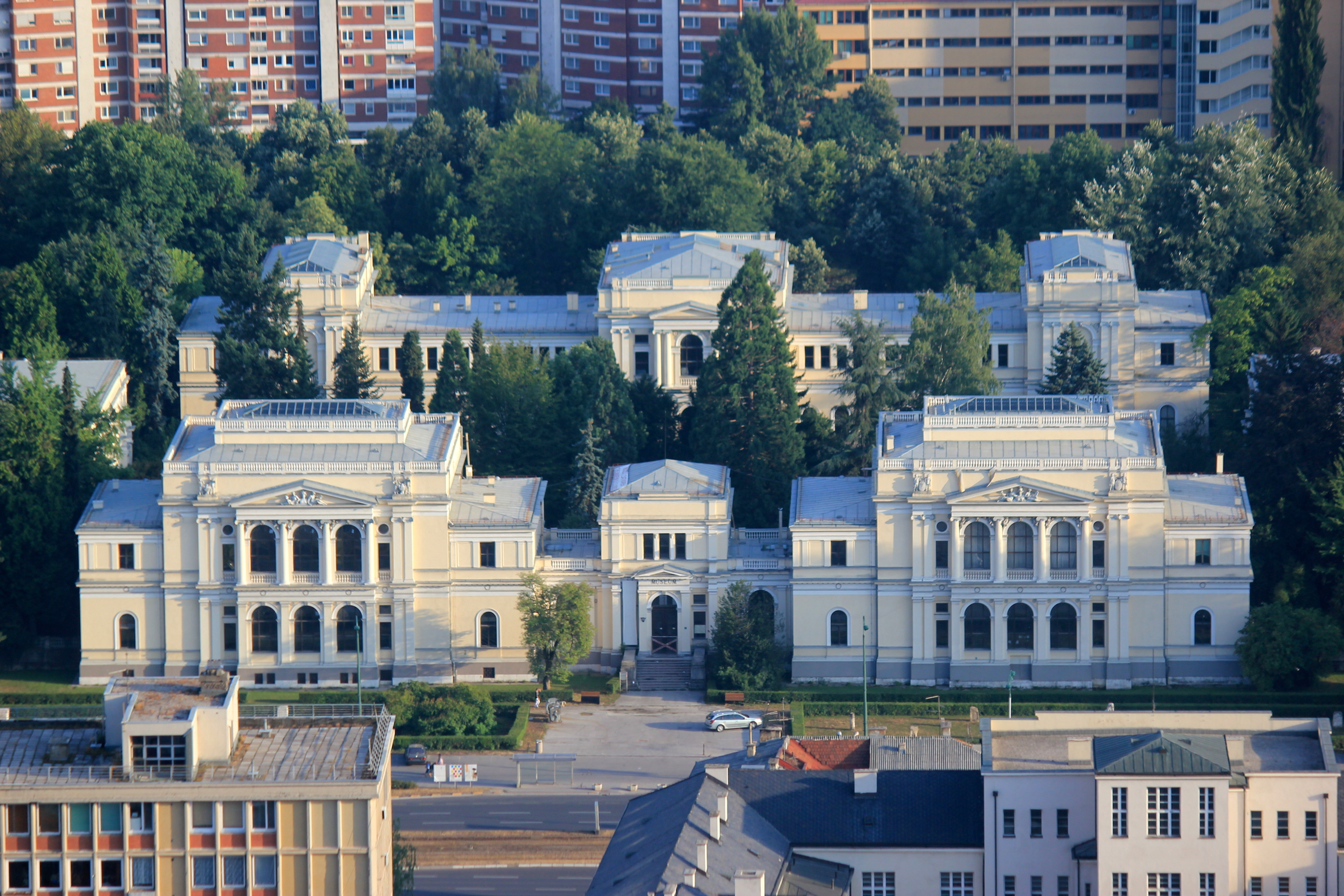 Das Nationalmuseum von Bosnien und Herzegowina von oben.